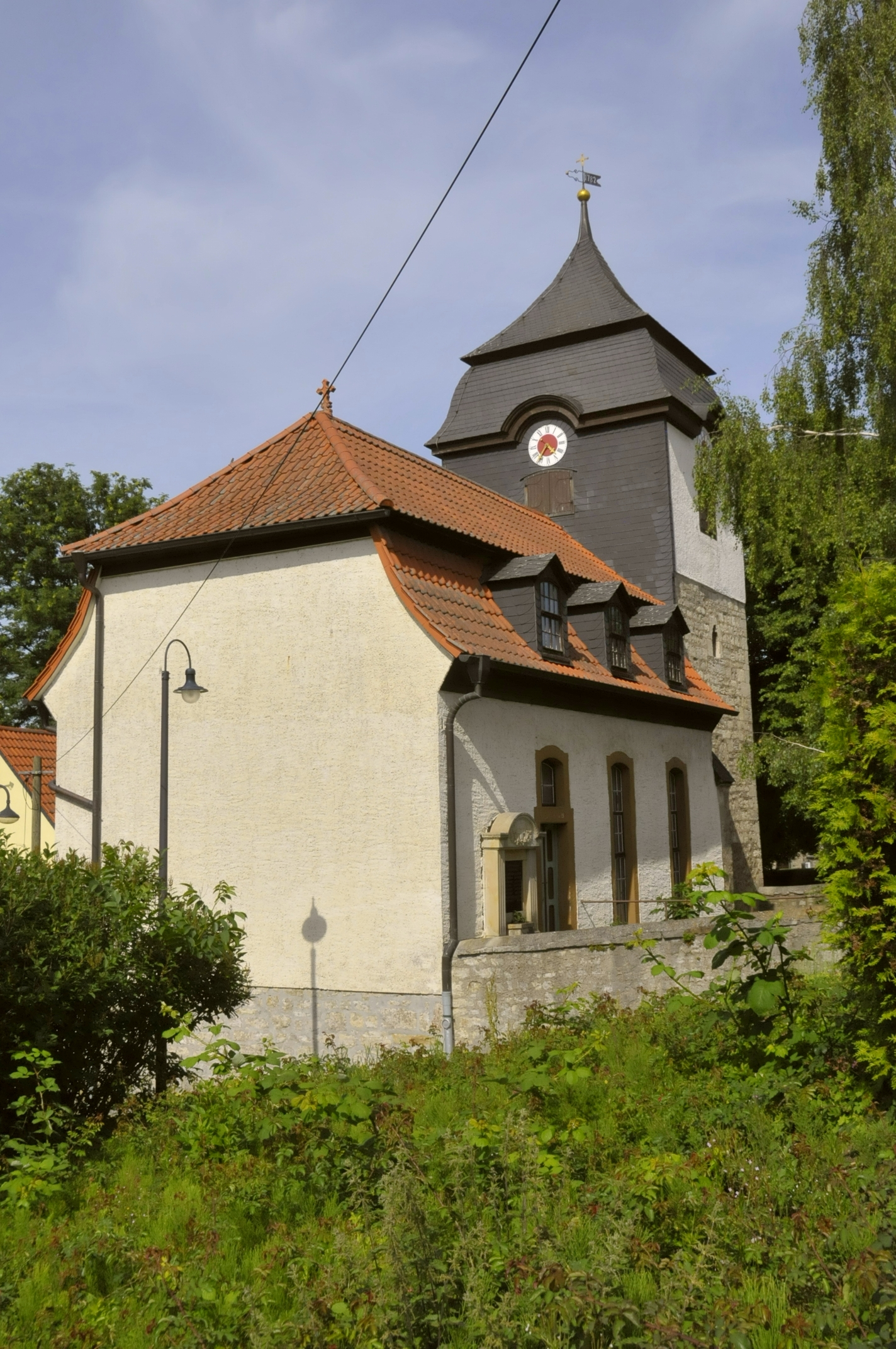 Dorfkirche in Schöten